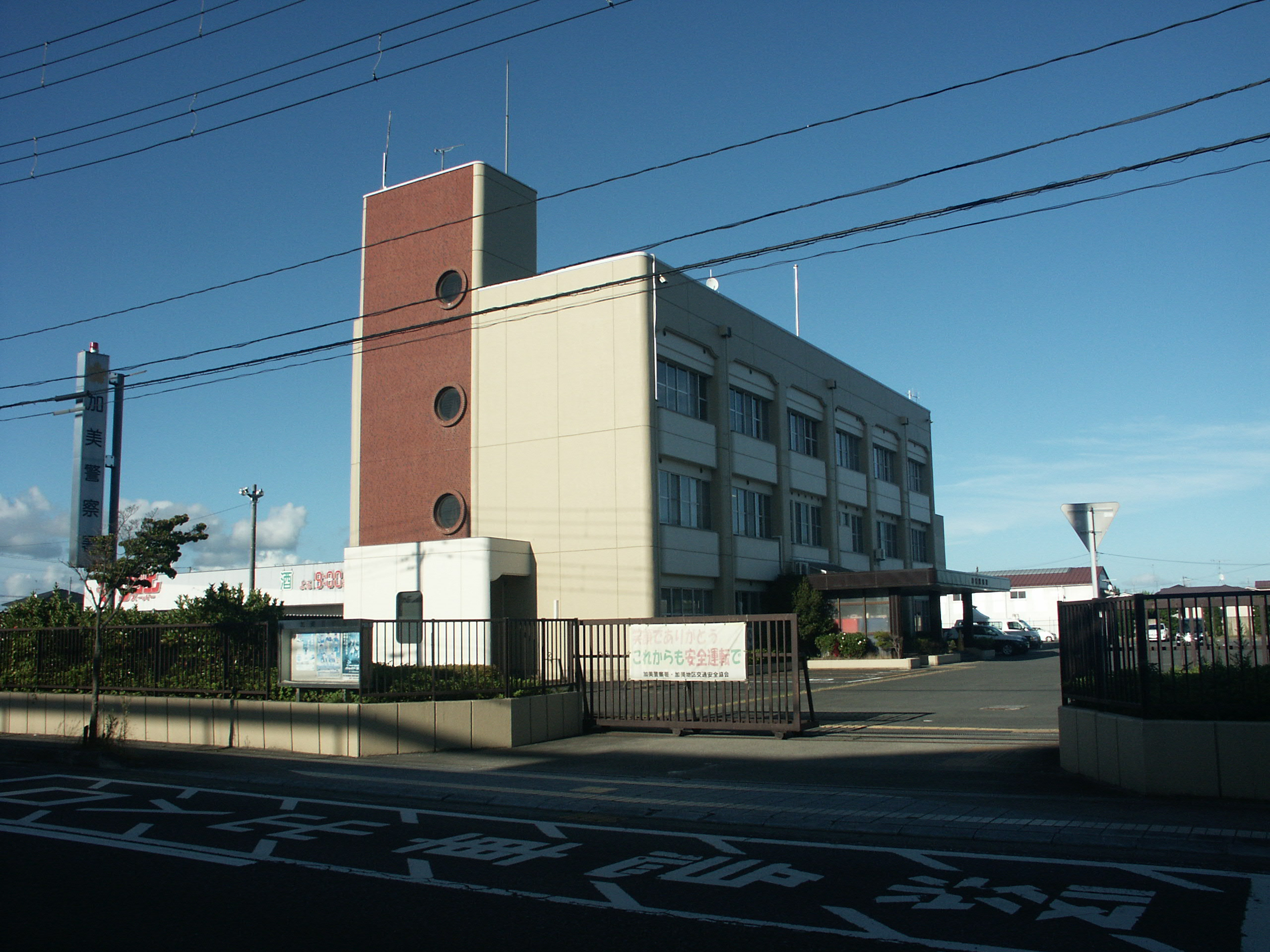 加美警察署庁舎